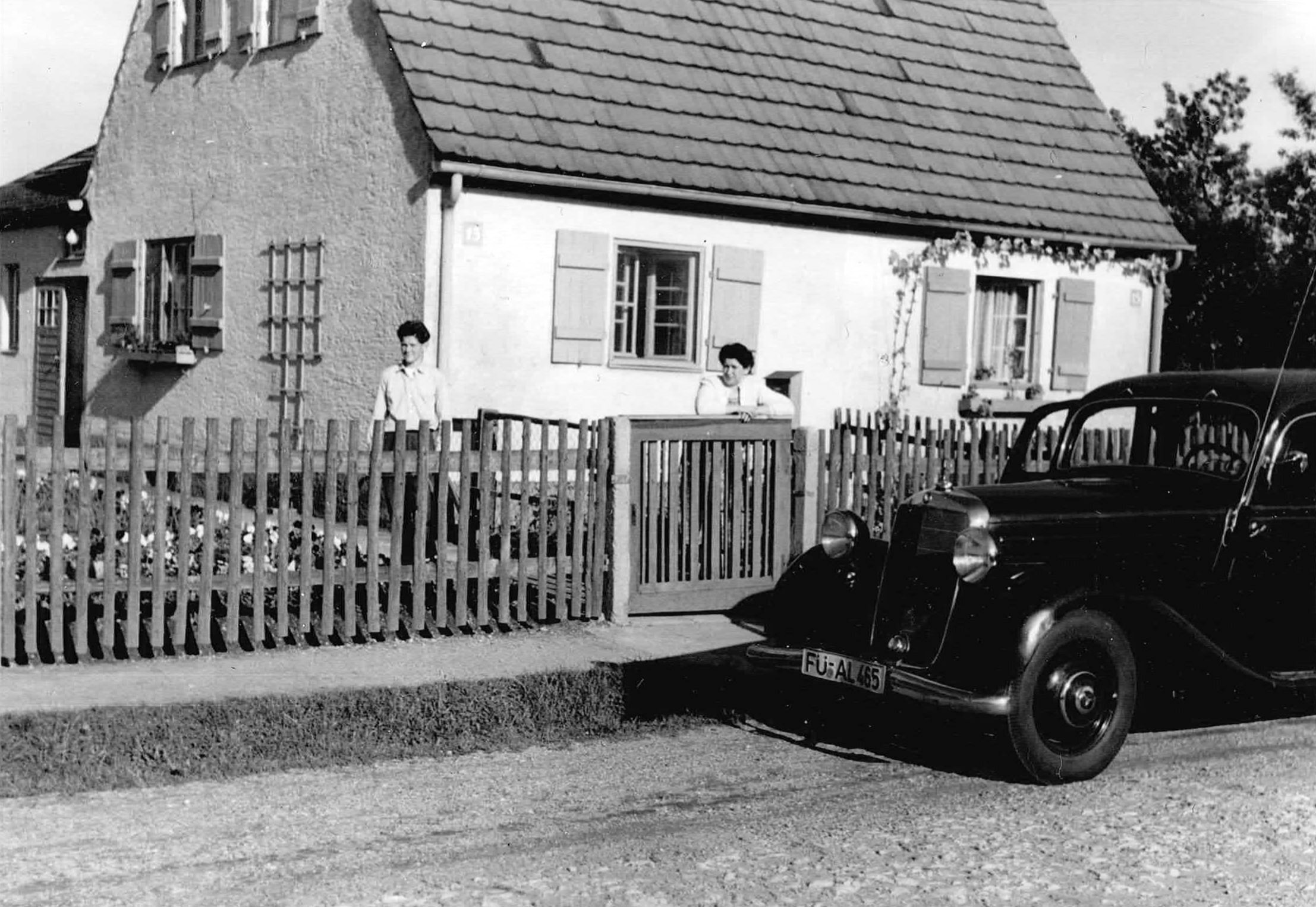 Siedlerhaus Nummer 13 in den 60er Jahren